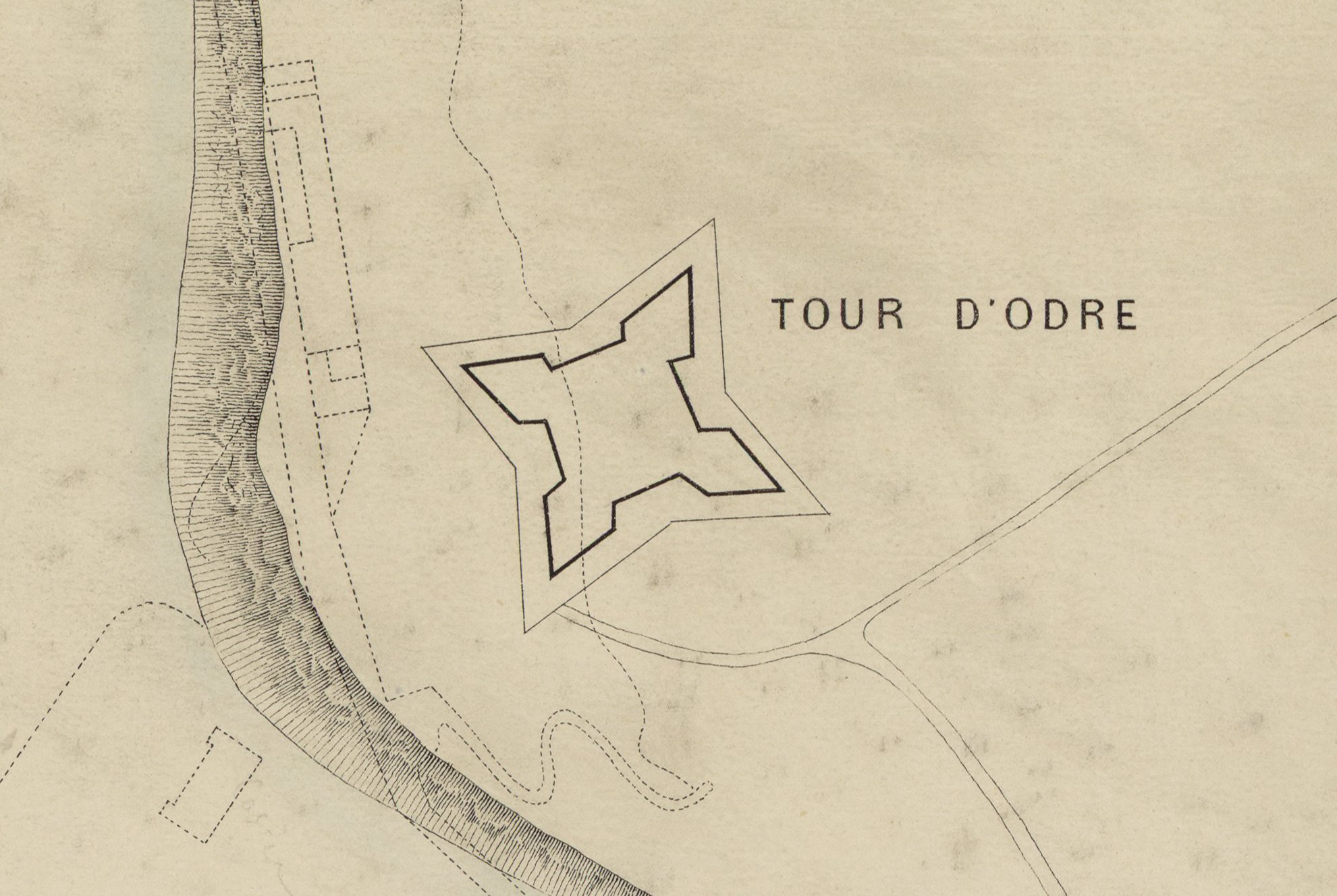 Plan du port et de la ville de Boulogne en 1544 / Dressé d'après le plan de M. Marmin père l'ingénieur des ponts chaussées Vivenon. Detail sur la Tour d'Odre/